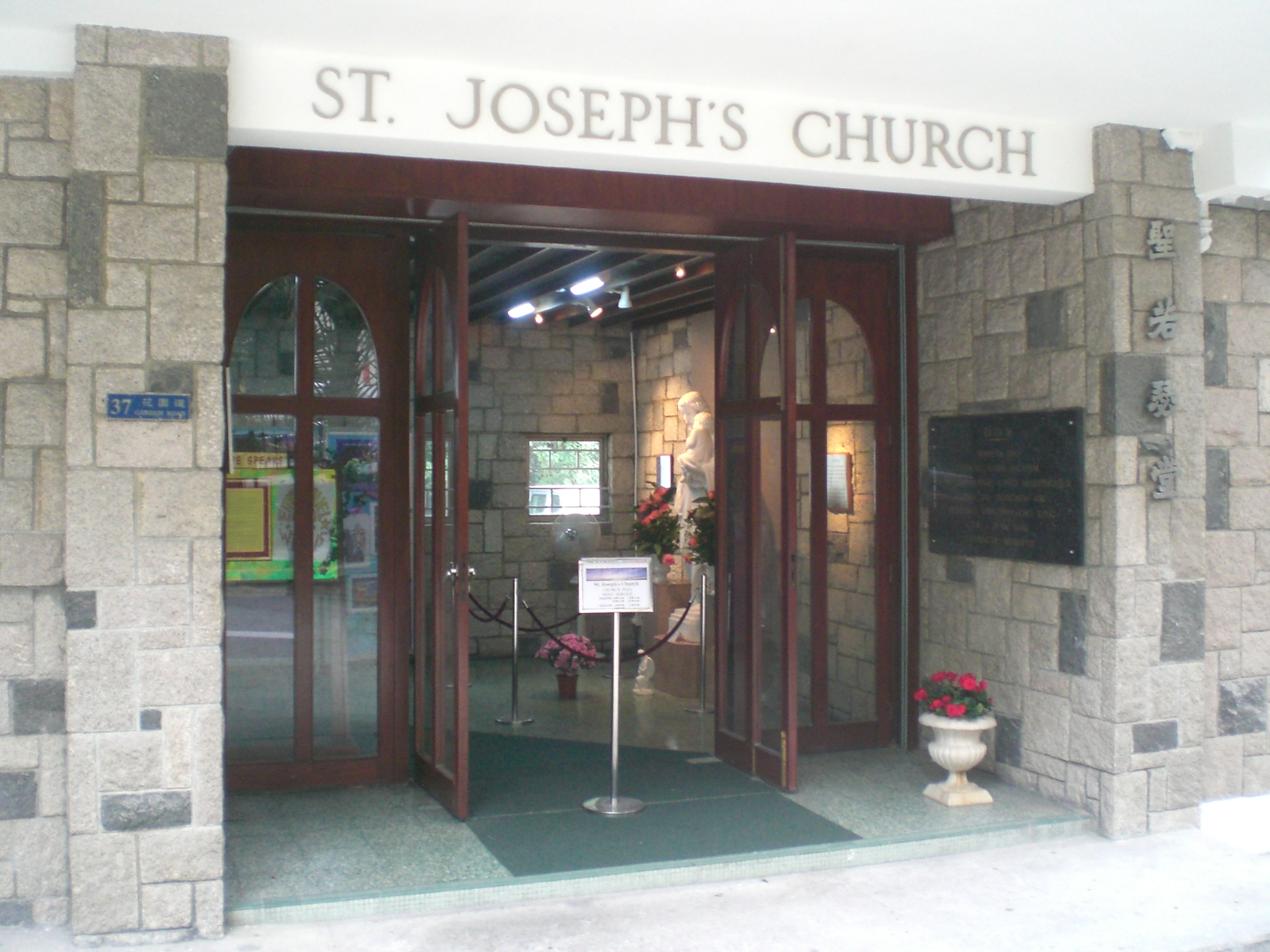 香港島花園道37號聖若瑟堂